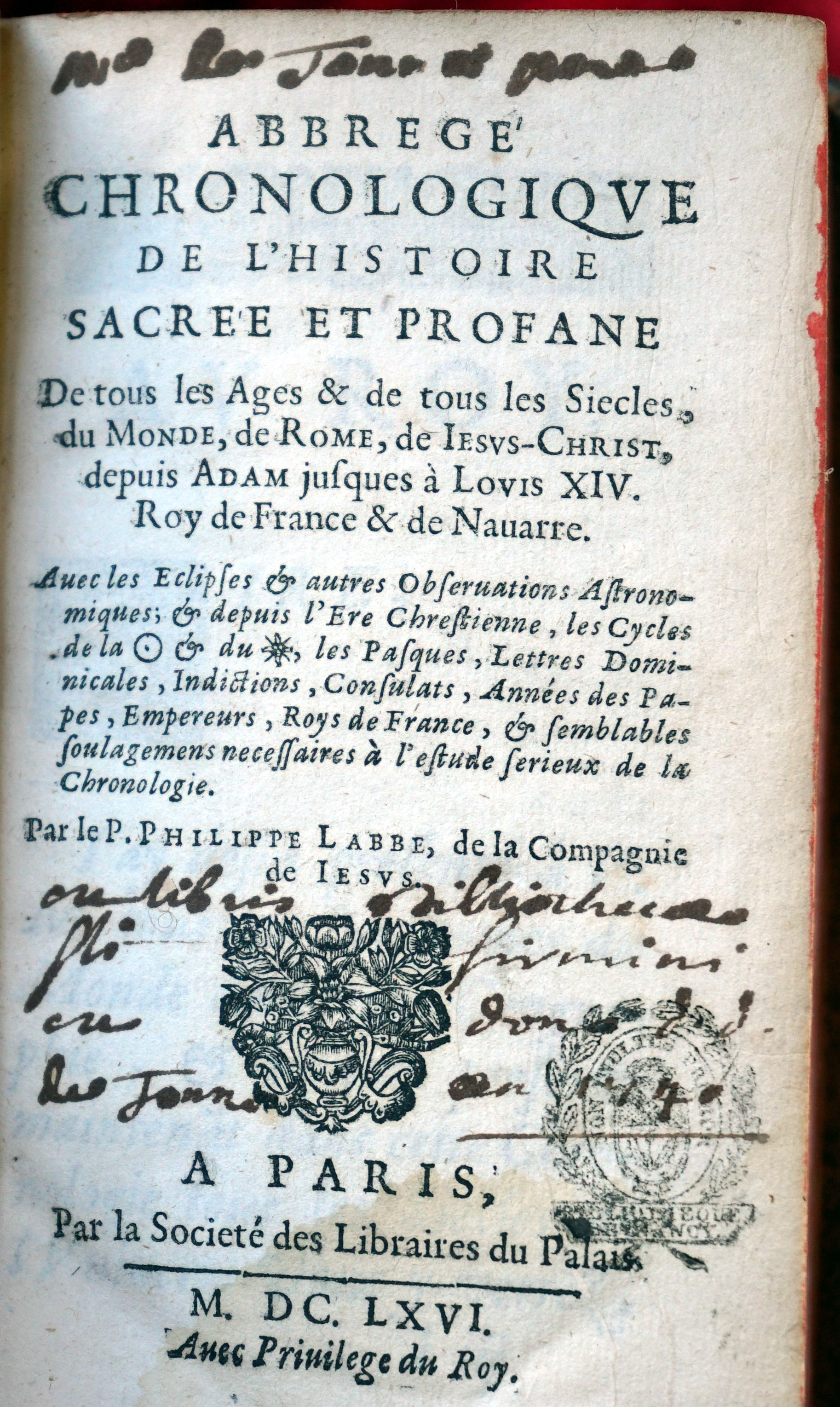 du livre conservé à Nancy.